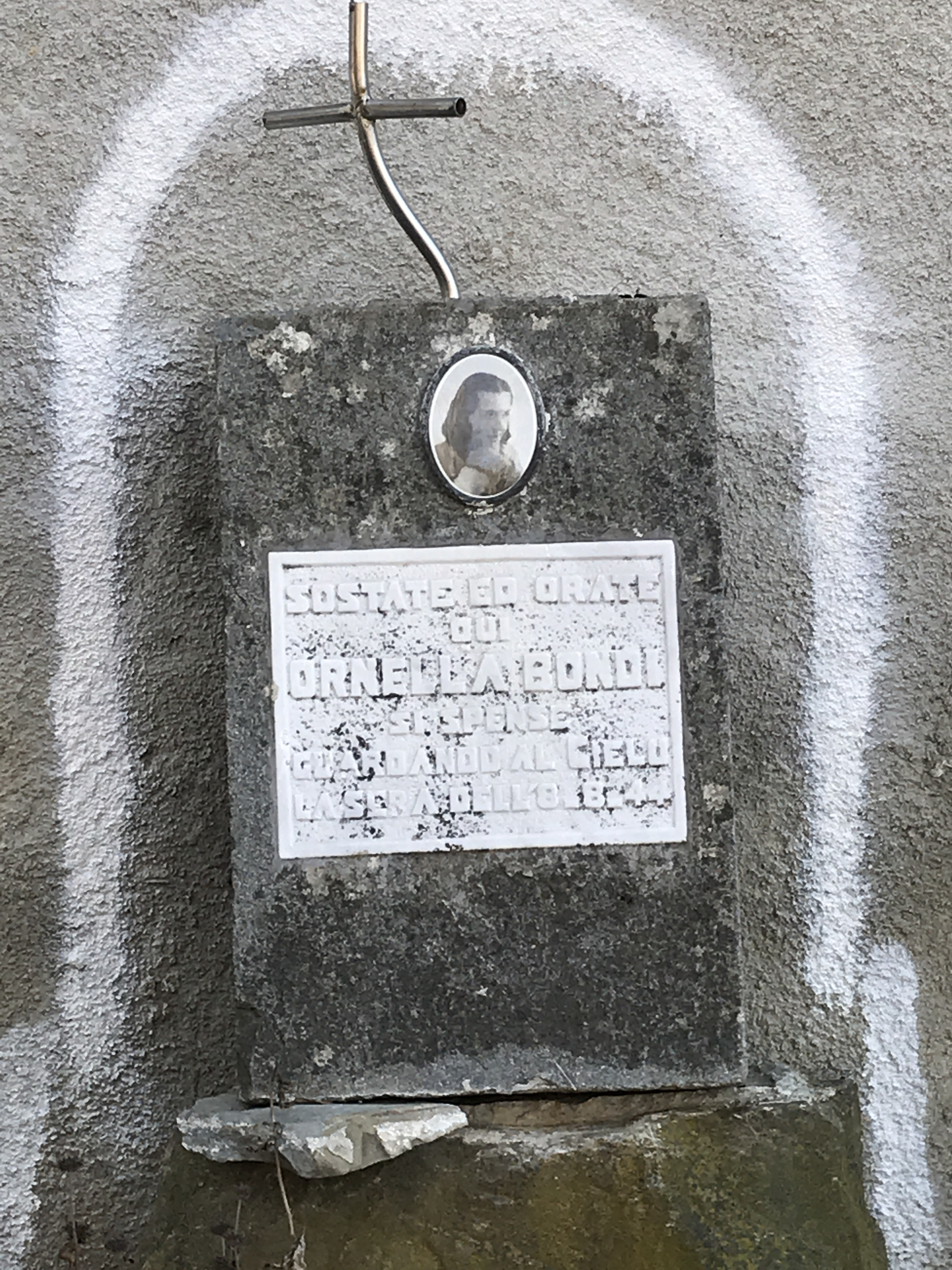 Lapide posta nel luogo dove Ornella Bondi una giovane ragazza ritenuta spia dei fascisti venne violentata e uccisa dai partigiani